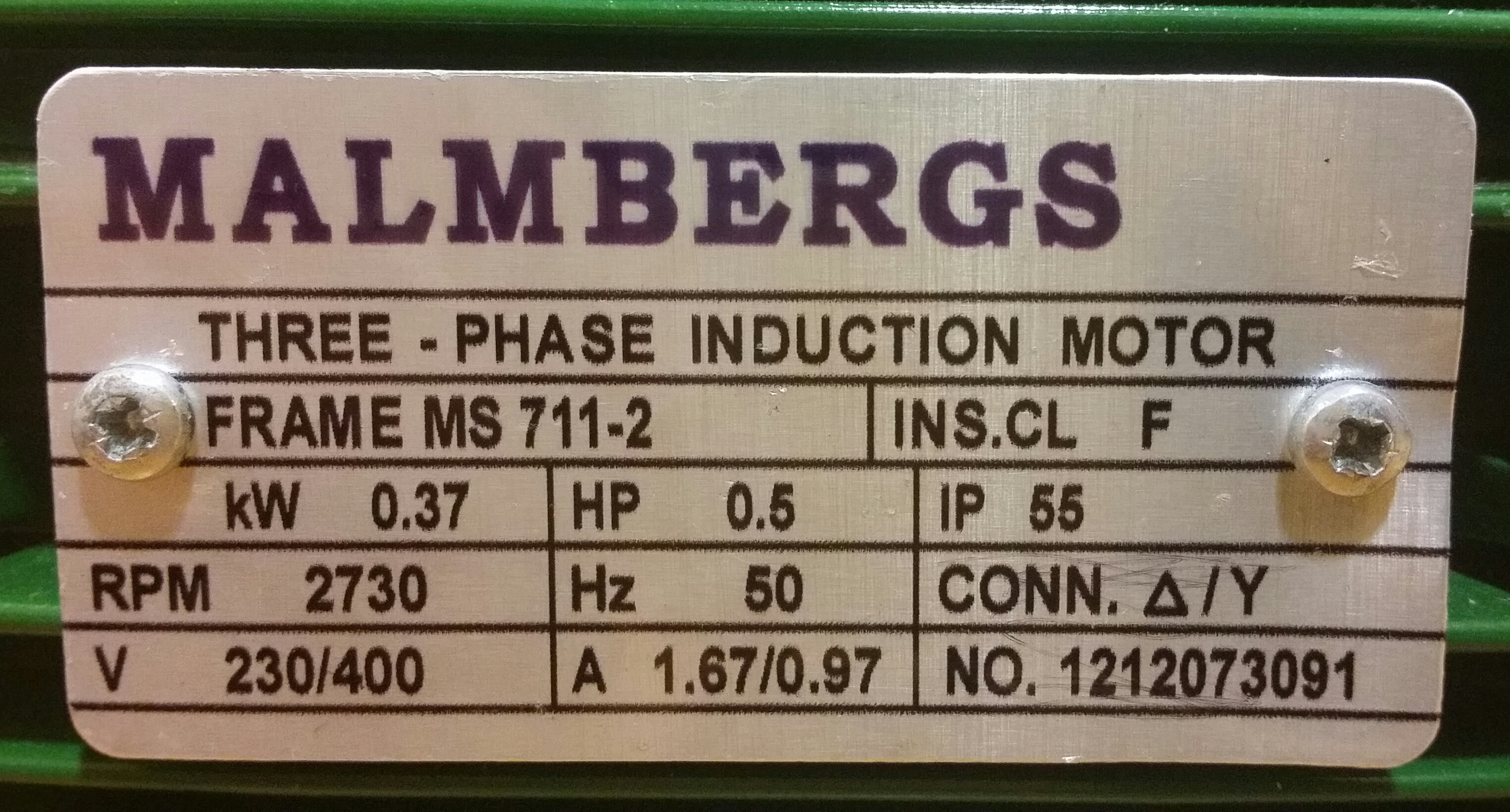 Märkplåt till en Malmbergsmotor